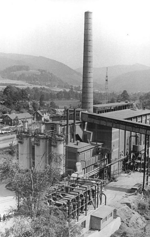 Unterloquitz, VEB Schiefergruben, Porensinteranlage ADN-ZB Liebers-5.9.73 Bez.Gera:Verbesserter Umweltschutz und höhere Qualität-Durch die gegenwärtige Generalreparatur an der Porensinteranalge im VEB Schiefergruben Unterloquitz wird sich nicht nur die Qualität erhöhen, sondern durch den Einbau einer wirksamen Abgasentstaubungsanlage am Schornstein wird ein wertvoller Beitrag für den Umweltschutz geleistet.In der Anlage wird aus Schiefer Porensinter gewonnen, der bei der Produktion für Großplatten gebraucht wird.Mit den vorgenommen Veränderungen wird es möglich sein, Porensinter in einer gleichbleibenden guten Qualität zu liefern.Dies kommt dem Wohnungsbau zu gute.Durch Planvorsprung haben die Schieferkumpel gesichert, daß während der mehrwöchigen Stillstandszeit die Lieferverträge gegenüber der Bauindustrie erfüllt werden.